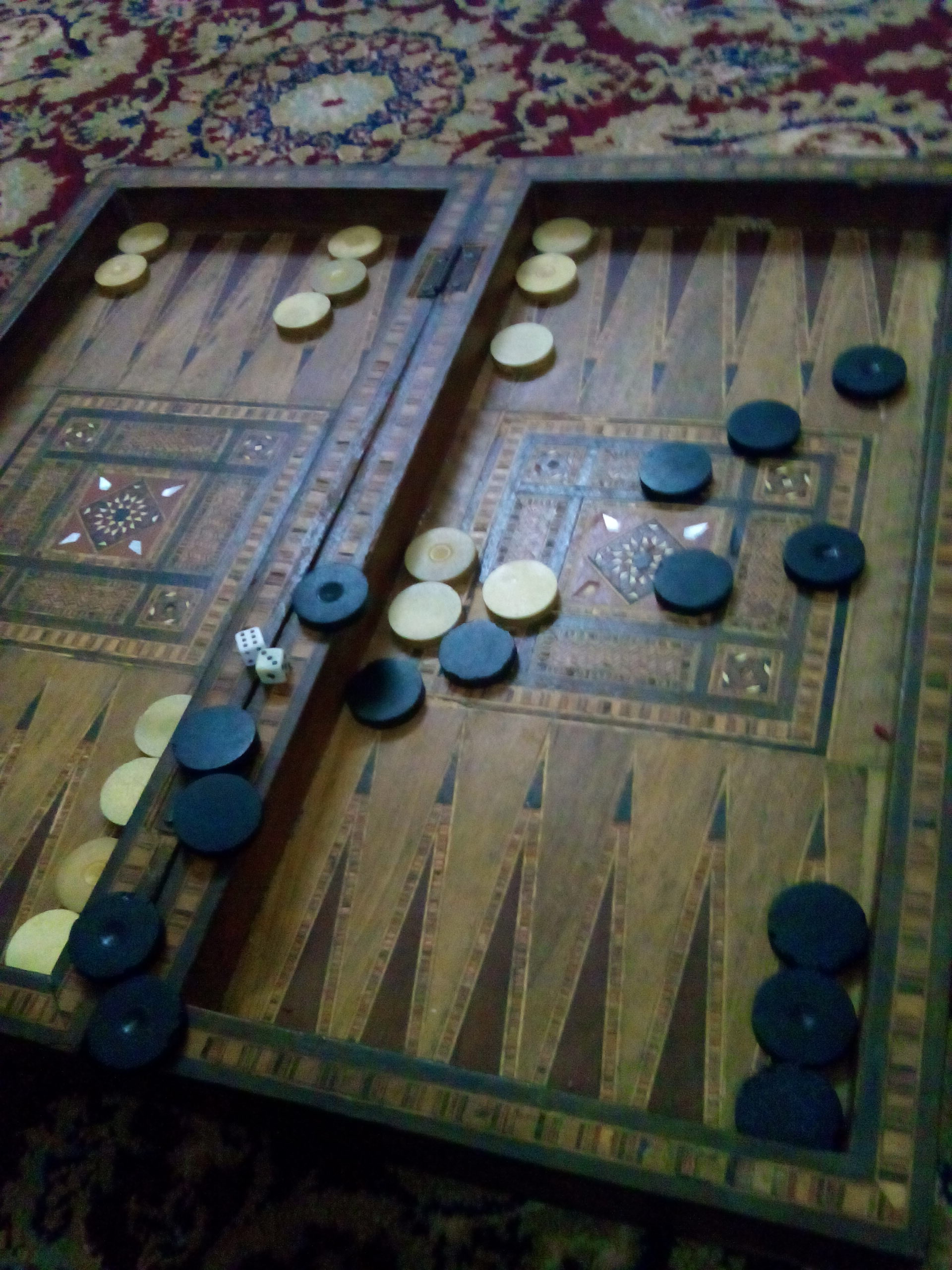 لوح خشبي للعبة الطاولة أو النَّرد في العراق، وهي لعبة مشهورة جداً في الشرق الأوسط والبلاد العربية، وتتكون من رقعة خشبية أو صندوق خشبي يمكن أن يكون مزخرفاً ومطعماً بالصدف أو بقطع خشبية ثمينة من الأبنوس، وعدد من الأقراص العاجية أو البلاستيكية أو الخشبية بلونين مختلفين عددها (15) من كل لون ونردين سداسيين.